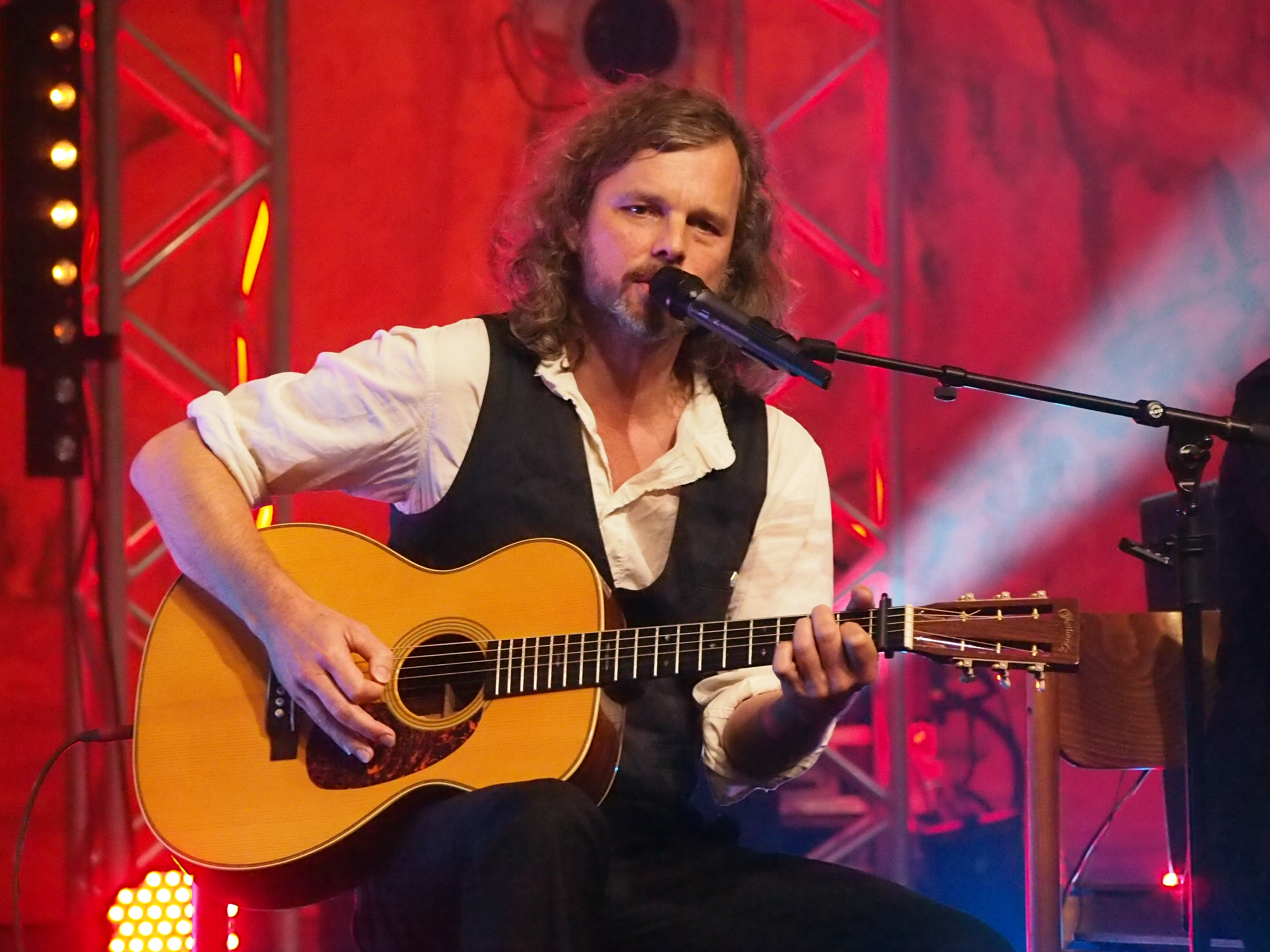 Heimatsound-Festival 2014 in Oberammergau, Dreiviertelblut, Gerd Baumann Festivalsommer This photo was created with the support of donations to Wikimedia Deutschland in the context of the CPB project "Festival Summer". This file is made available under the Creative Commons CC0 1.0 Universal Public Domain Dedication. The person who associated a work with this deed has dedicated the work to the public domain by waiving all of their rights to the work worldwide under copyright law, including all related and neighboring rights, to the extent allowed by law. You can copy, modify, distribute and perform the work, even for commercial purposes, all without asking permission. Personality rights warningAlthough this work is freely licensed or in the public domain, the person(s) shown may have rights that legally restrict certain re-uses unless those depicted consent to such uses. In these cases, a model release or other evidence of consent could protect you from infringement claims.